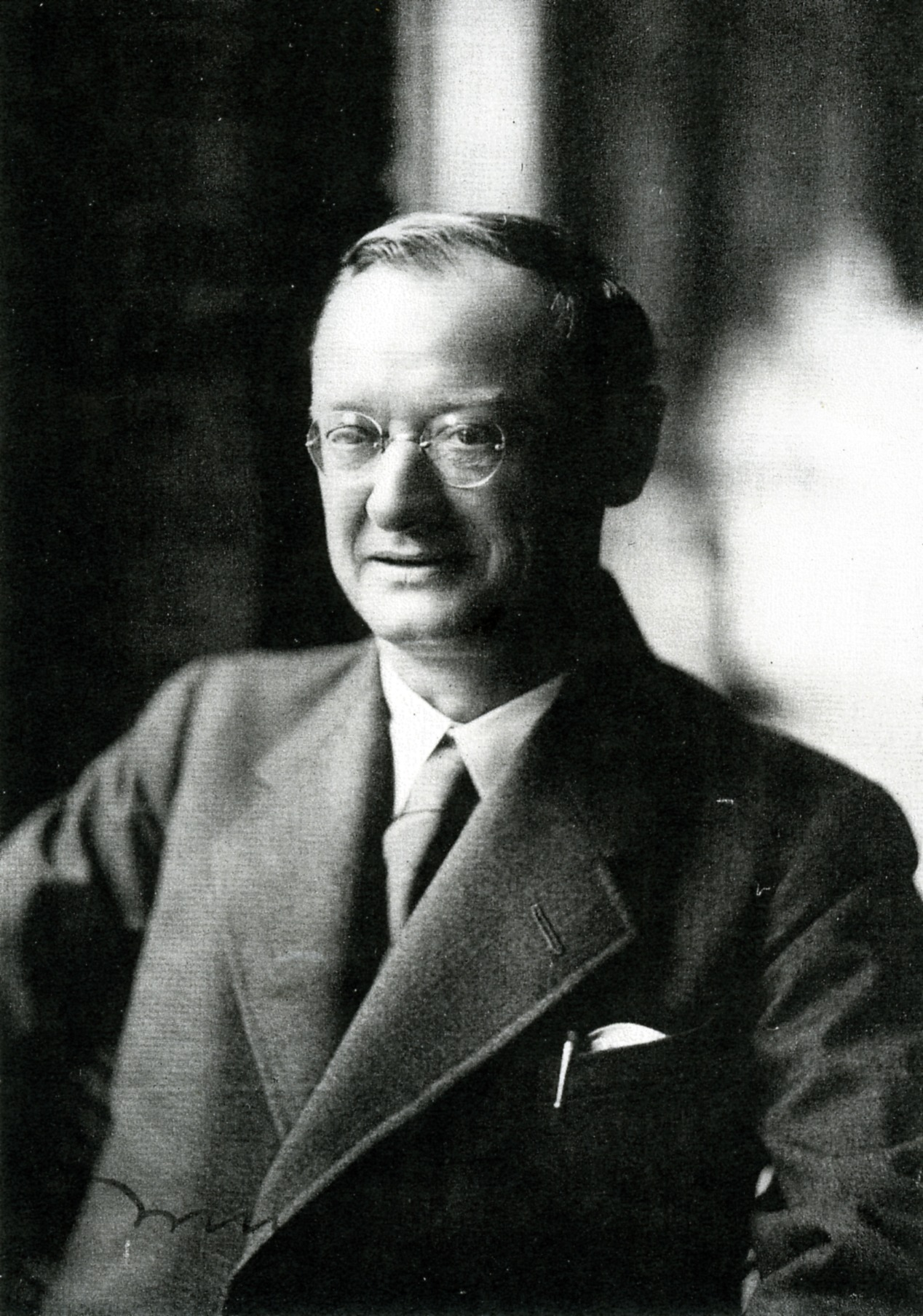 ブルーノ・タウト（Bruno Julius Florian Taut、1880-1938）、ドイツ人の建築家。1933-36年に日本に滞在。